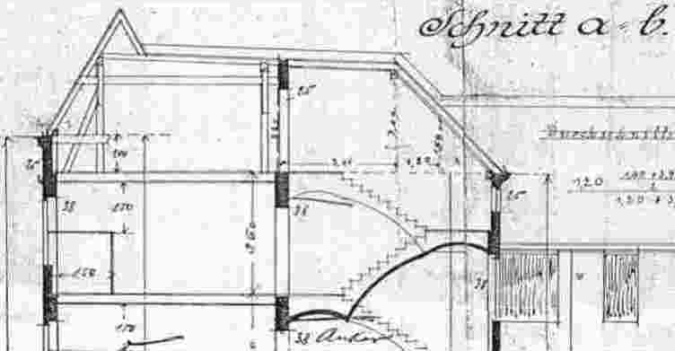 Berliner_Dach_Querschnitt